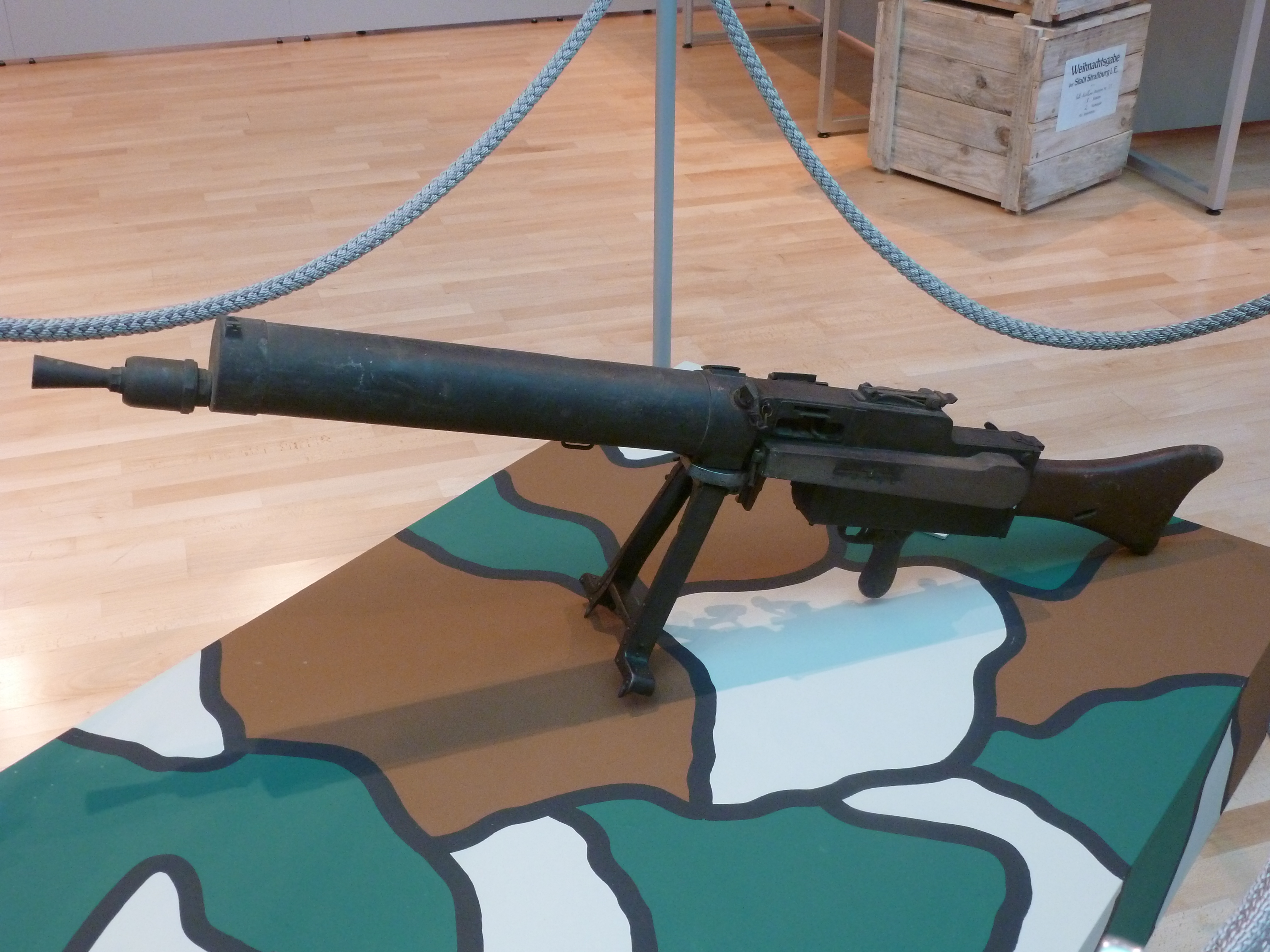 Mitrailleuse allemande MG 08/15, Erfurth Waffenfabrik 1917.